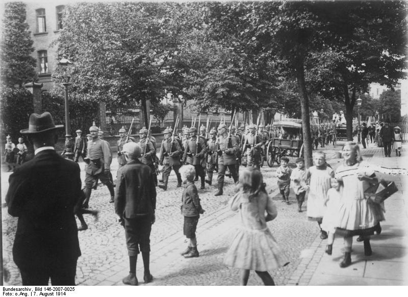 Zur Erinnerung an den 7. August 1914. 5/160 vor der Kaserne; Hpt. d. Res. Dreßen , der 3. Zug der 5./160 Die Kleinsten vorne vor der Ermekeil-Kaserne Bonn.